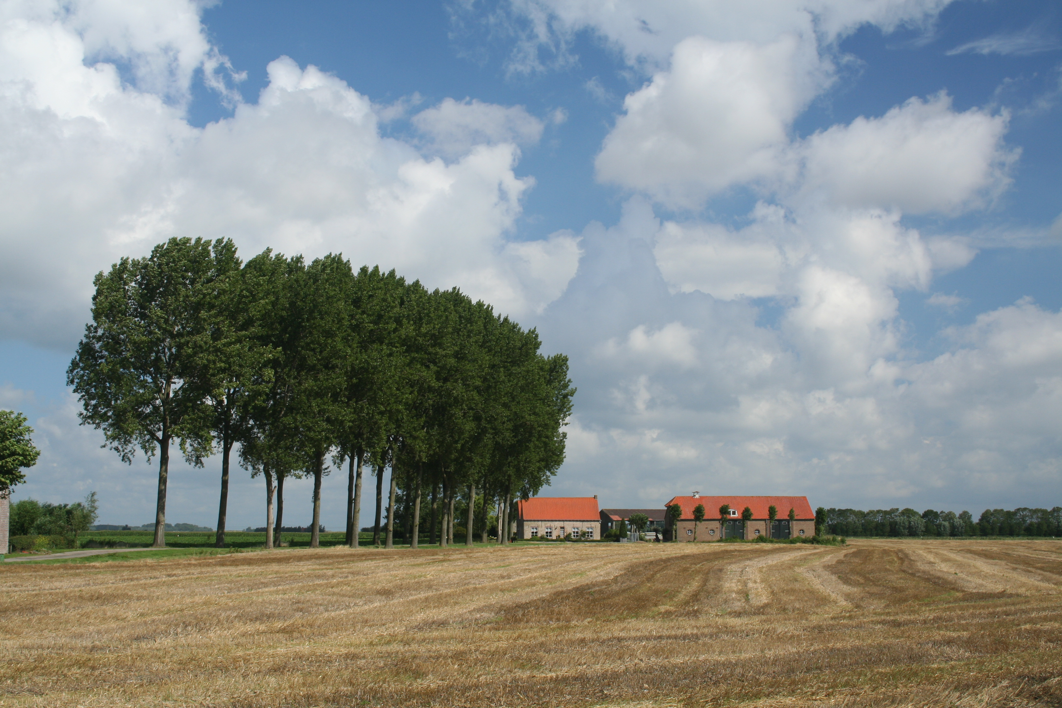 Jonkvrouw Geilstraat 3 te Sint Anna ter Muiden